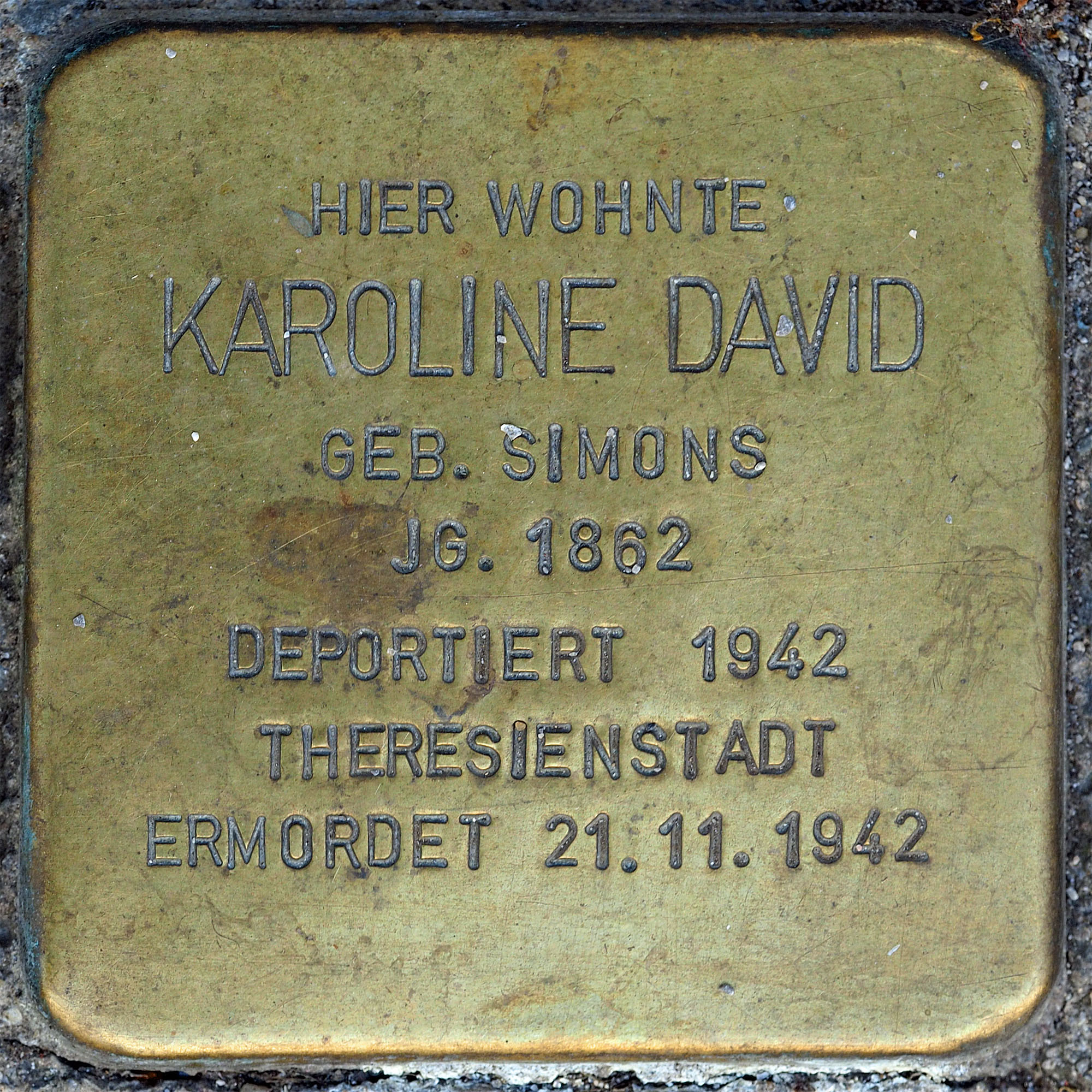 Stolpersteine Wesel: David, Karoline